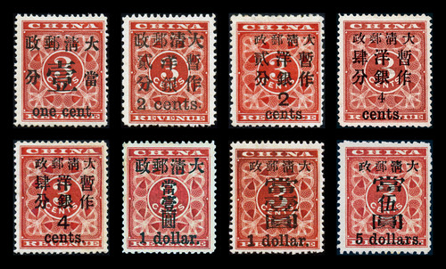 紅印花郵票八枚全套